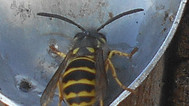 Vosa norská konzumuje sladký roztok na umělém krmítku. Vzor na zadečku těchto vos značně kolísá a postupně přechází do kresby vosy útočné.